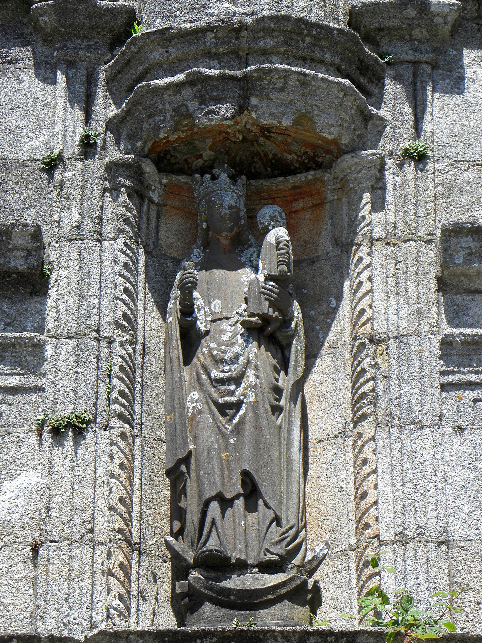 Porche sud de l'église Notre-Dame de Bodilis (29). Vierge à l'Enfant.